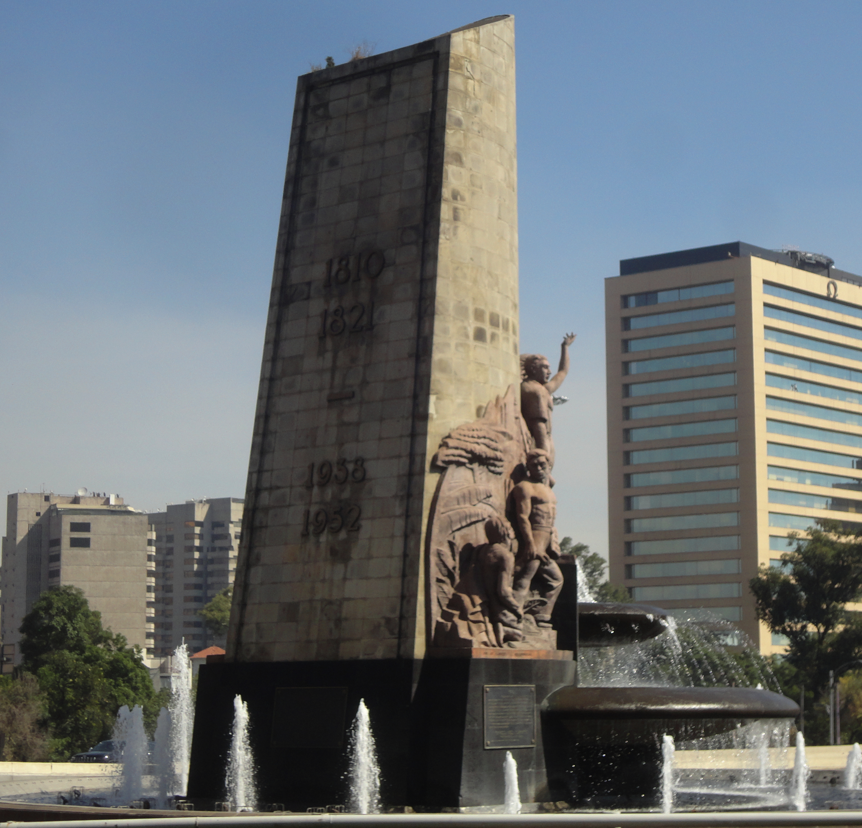 Fuente de Petróleos, CDMX, México. Obra del arquitecto Vicente Mendiola Quezada y del escultor Juan Fernando Olaguíbel Rosenzweig.